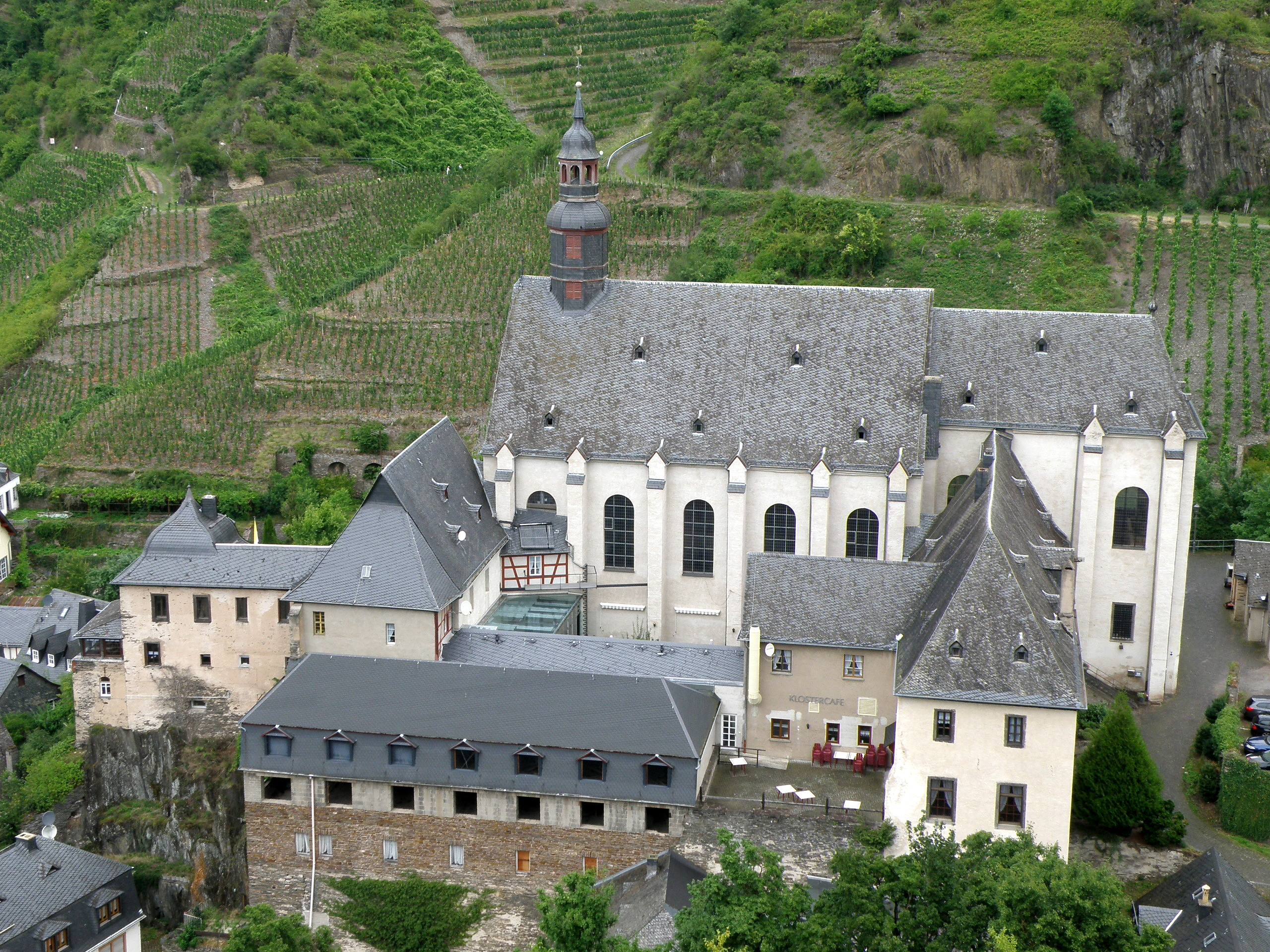 Beilstein (Rheinland-Pfalz, Deutschland). Karmeliterkirche, von der Burg aus gesehen.